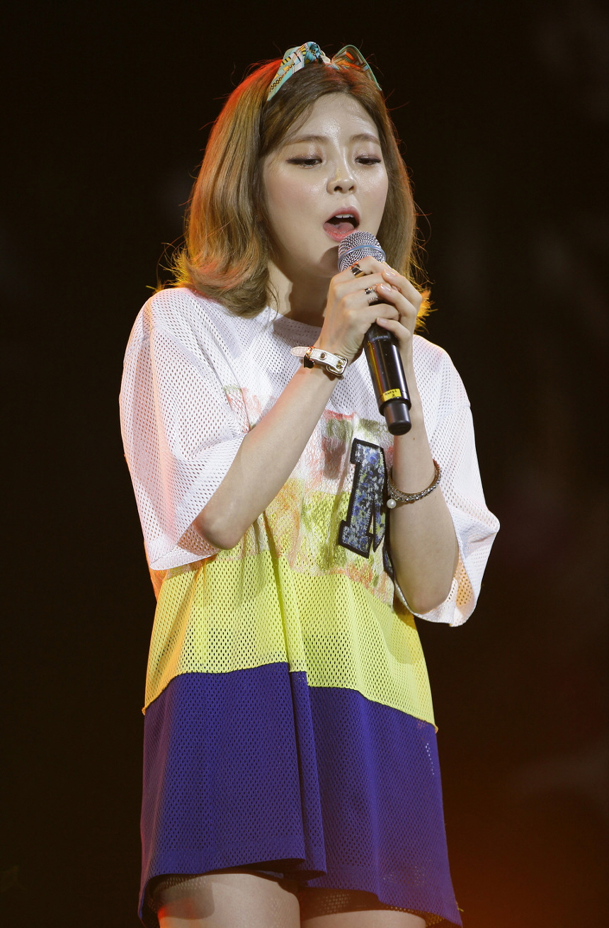 혜이니(HEYNE) 2016 월드 핏스타 코리아 모델 선발대회 축하공연